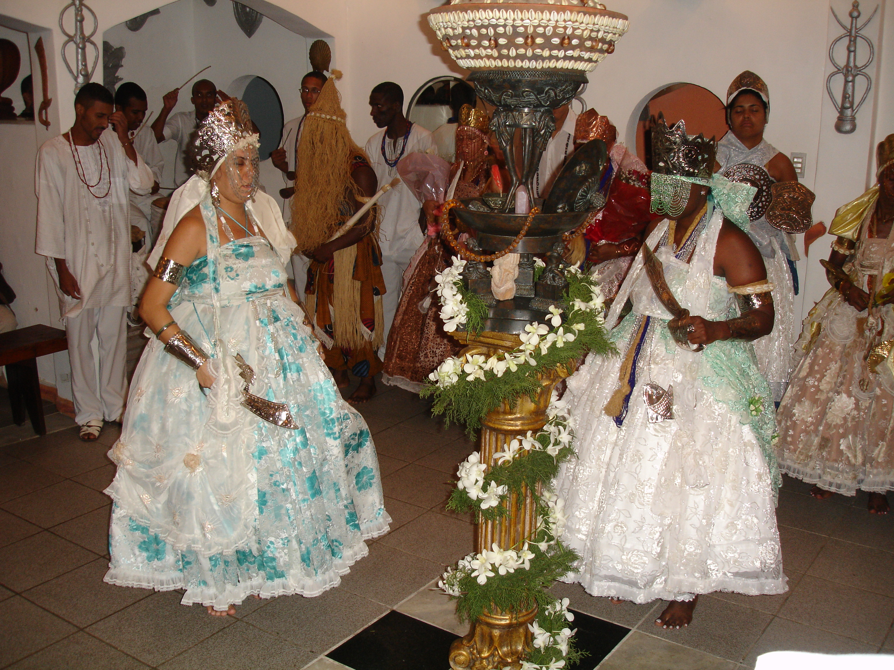 Oria Yemanja Orossi